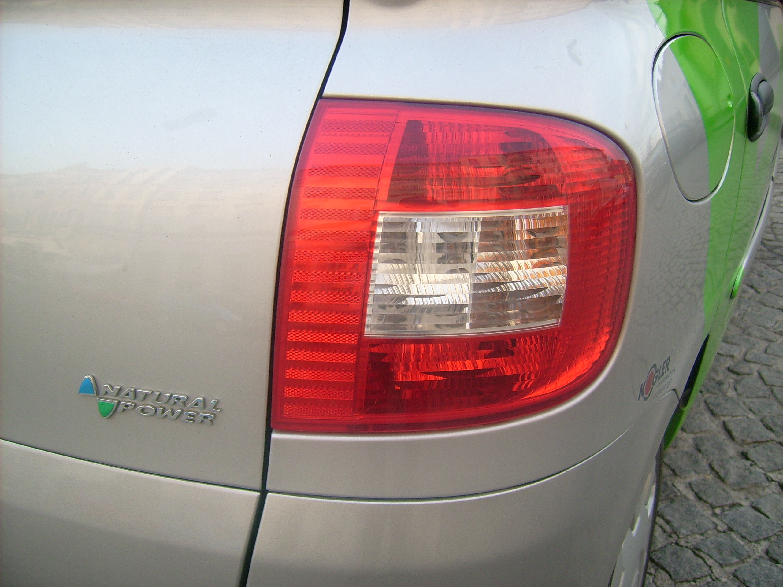 Foto, GRiessplatz Graz